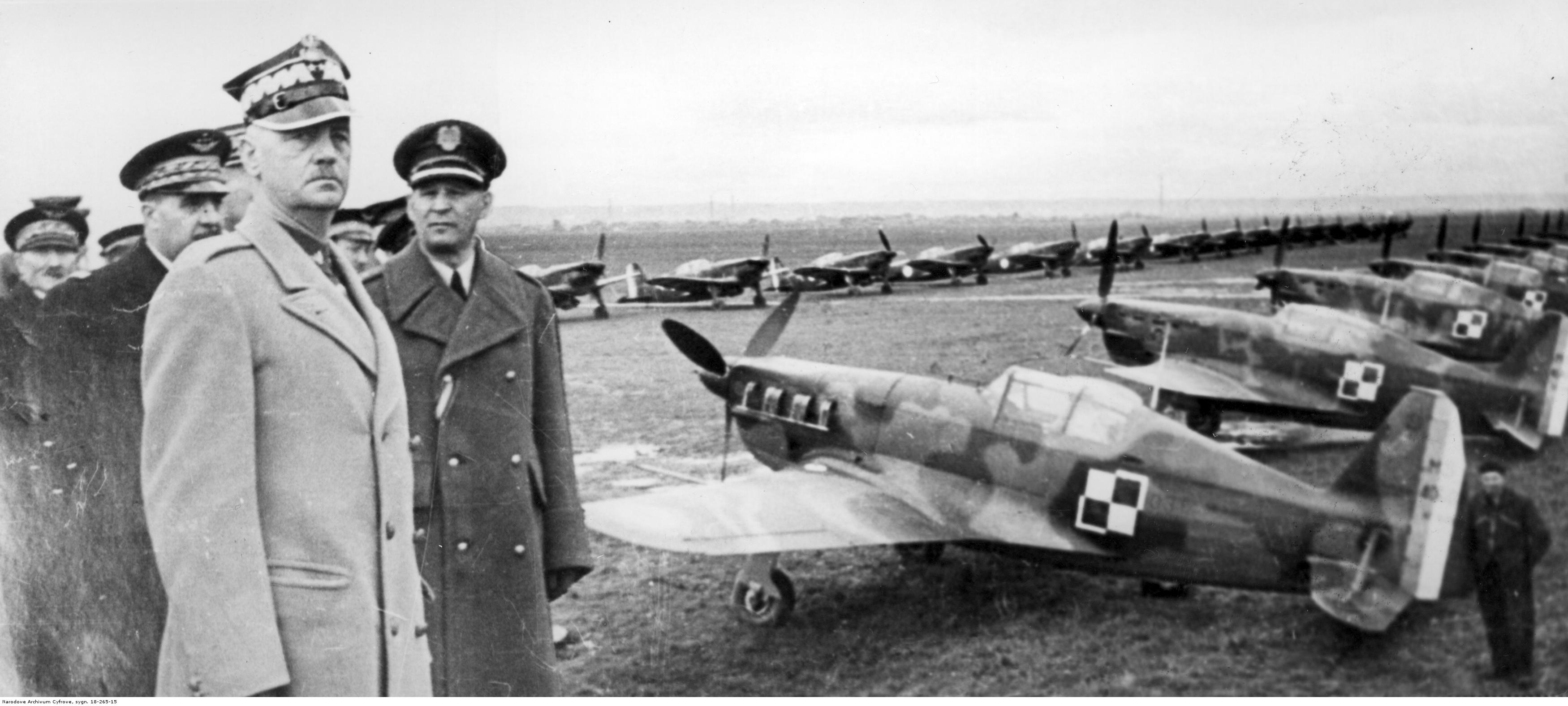 Wizyta gen. Władysława Sikorskiego w ośrodku szkoleniowym Polskich Sił Powietrznych w Bron - przygotowanie do defilady. Od prawej: gen. Józef Zając, gen, Władysław Sikorski, gen. Victor Denain. Widoczne także samoloty myśliwskie Morane Saulnier MS 406. Archiwum Fotograficzne Czesława Datki. Sygnatura: 18-265-15